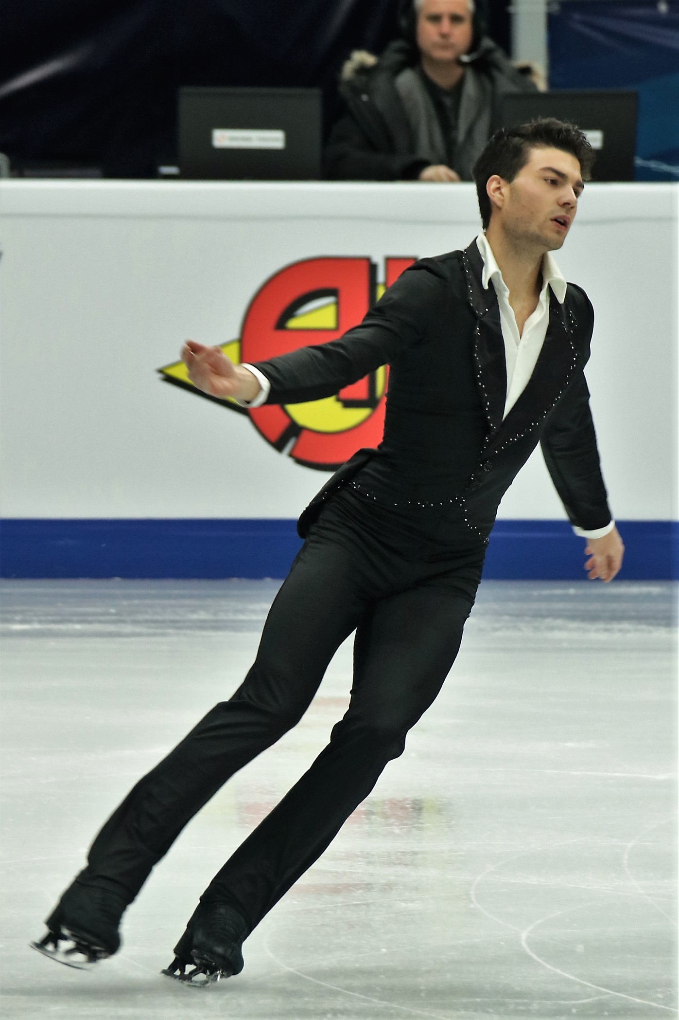 Ромэн Понсар (Франция) на Чемпионате Европы по фигурному катанию 2018.